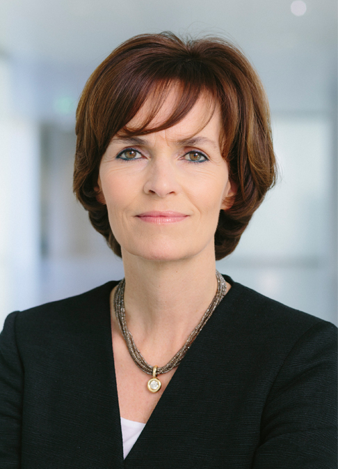 Portrait von Dr. Nicola Leibinger-Kammüller aus dem Jahr 2014.